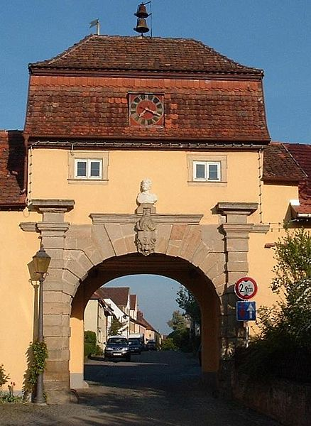 Riedbachtor at Bartenstein (Schrozberg). The original page says "Riedbachtor, eines von noch 2 vorhandenen Stadttoren, erbaut 1767 nach Plänen von Baudirektor Gallasini, Foto 2004 selbst aufgenommen".